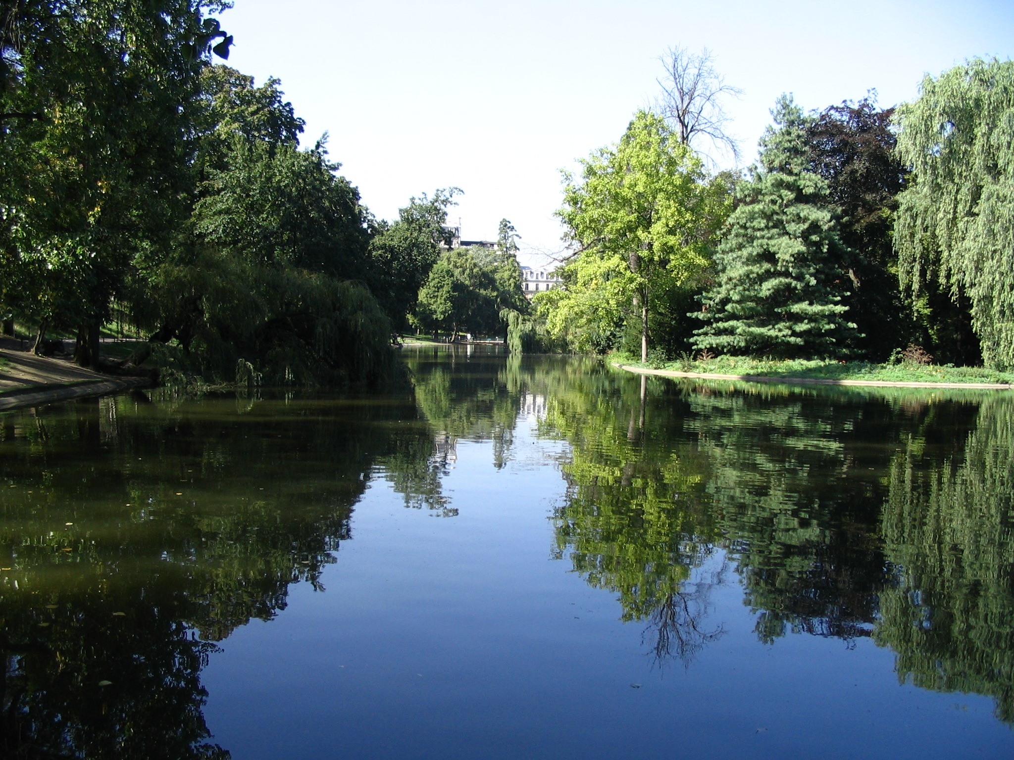 Lac de Saint-Mandé - France Lake of Saint-Mande near Paris - France Auteur/author: P.Charpiat - 2006